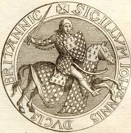 Sceau de Jean II de Bretagne, duc de Bretagne